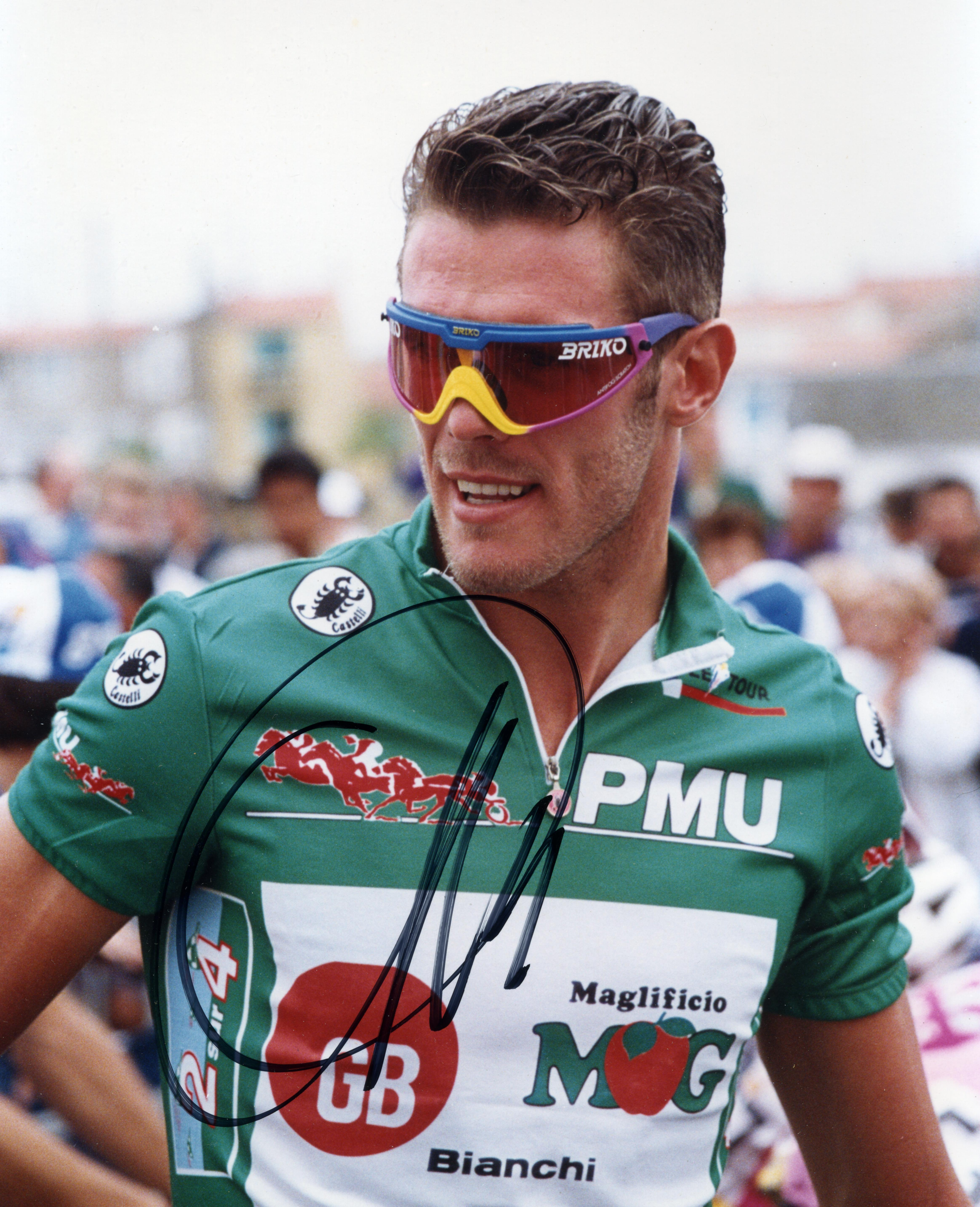 Mario CIPOLLINI Départ des Sables D'Olonne TDF 1993